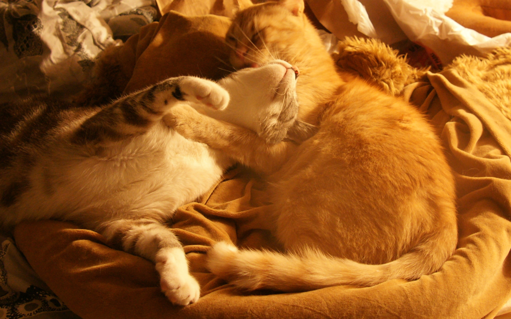 rapture